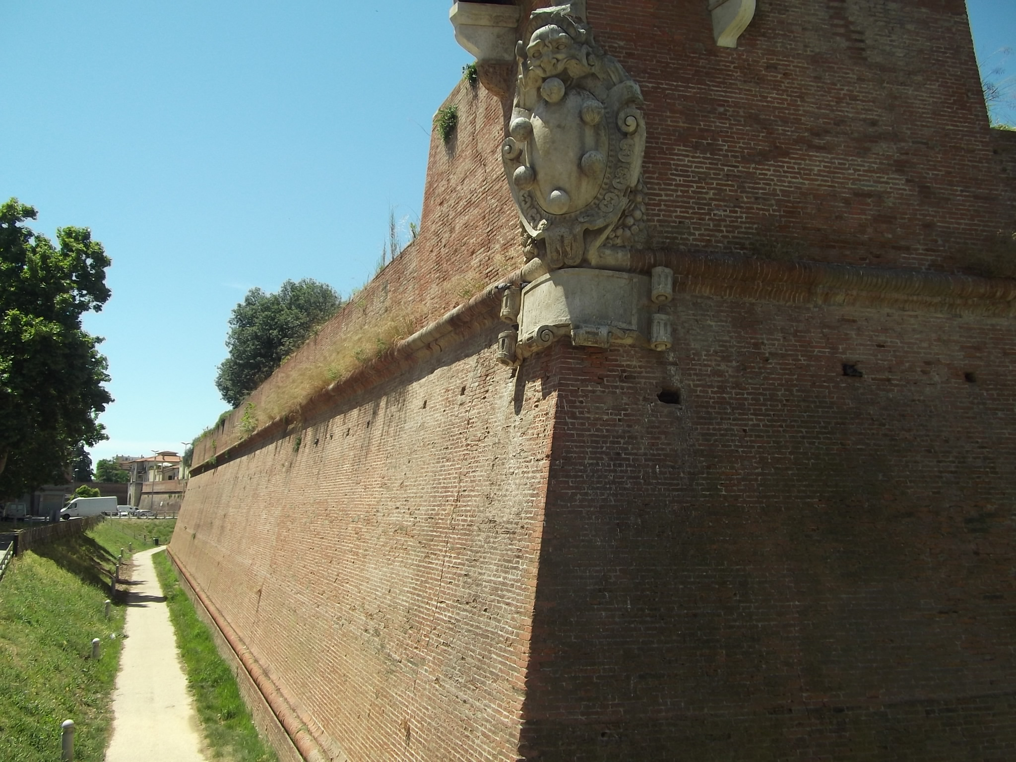 Stadtmauer in Grosseto mit Wappen der Medici